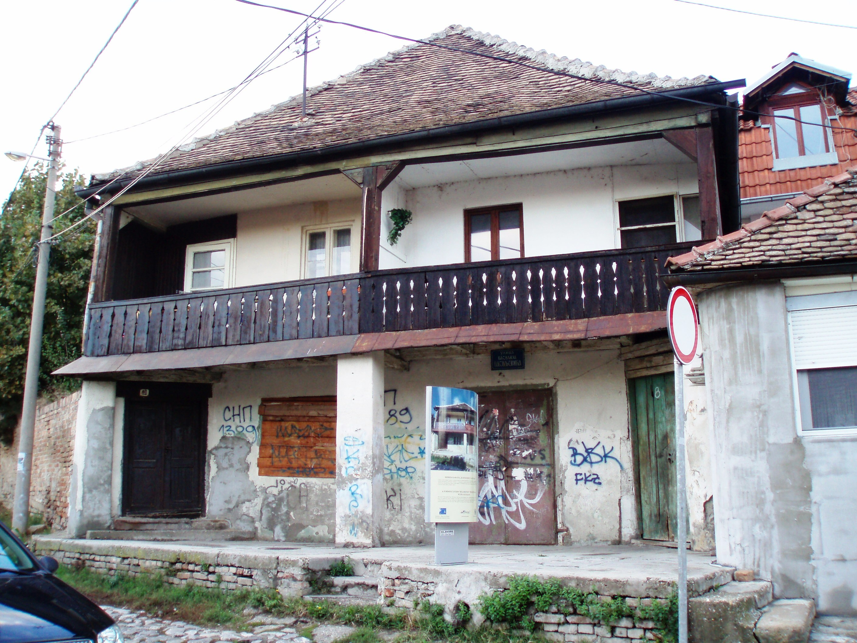 Kafana "Beli medved" jedna od najstarijih kuća u Zemunu, autor fotografije:Nicolo